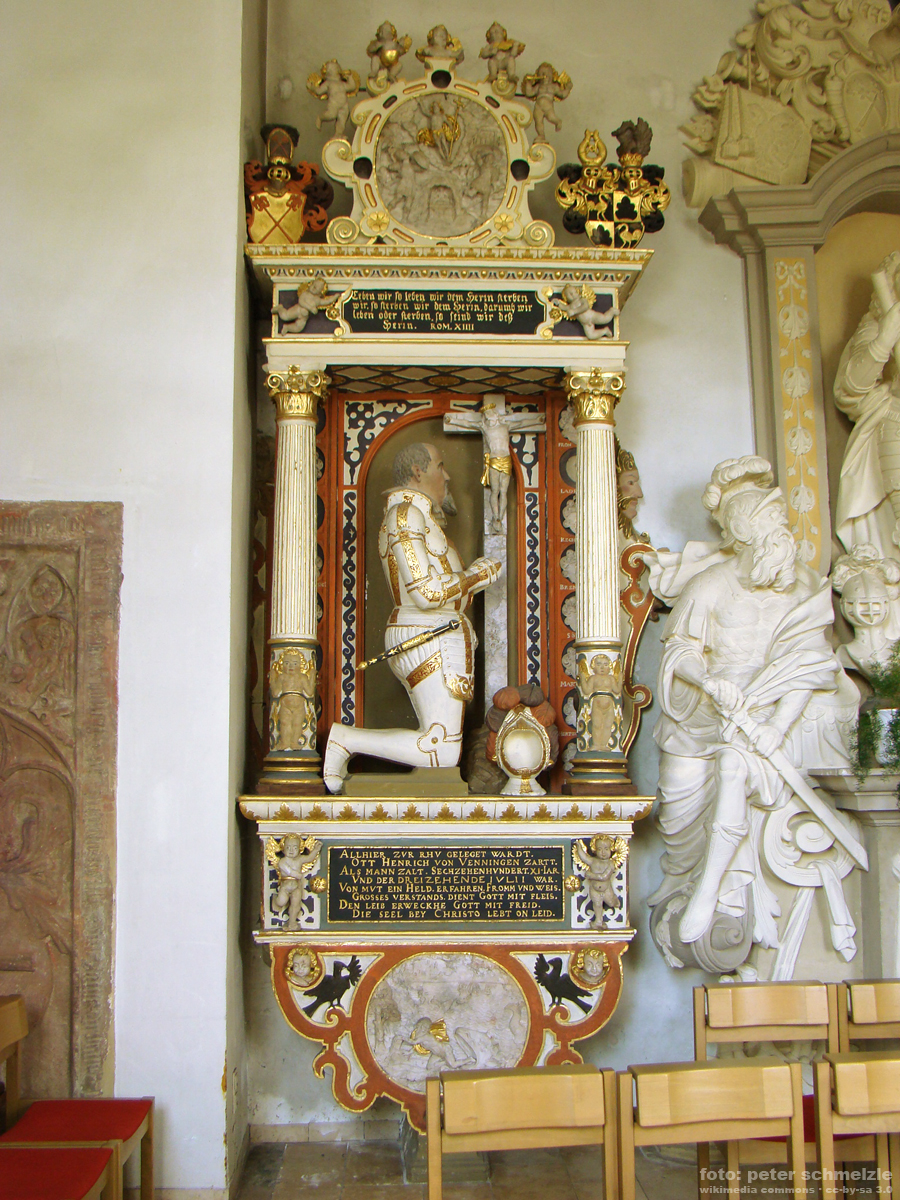 Evangelische Kirche Neidenstein, Grabmal des Ottheinrich von Venningen